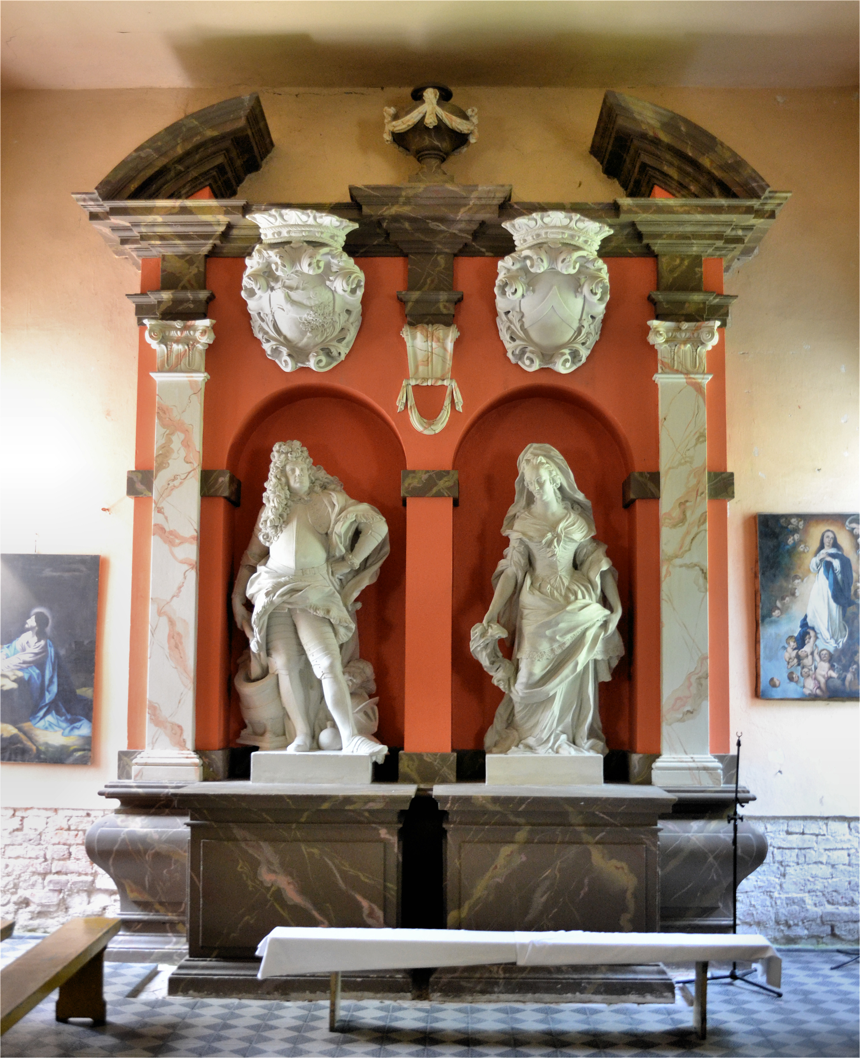 Dąbroszyn - dawny kościół ewangelicki, obecnie rzymskokatolicki filialny p.w. św. Józefa, 1825-1828